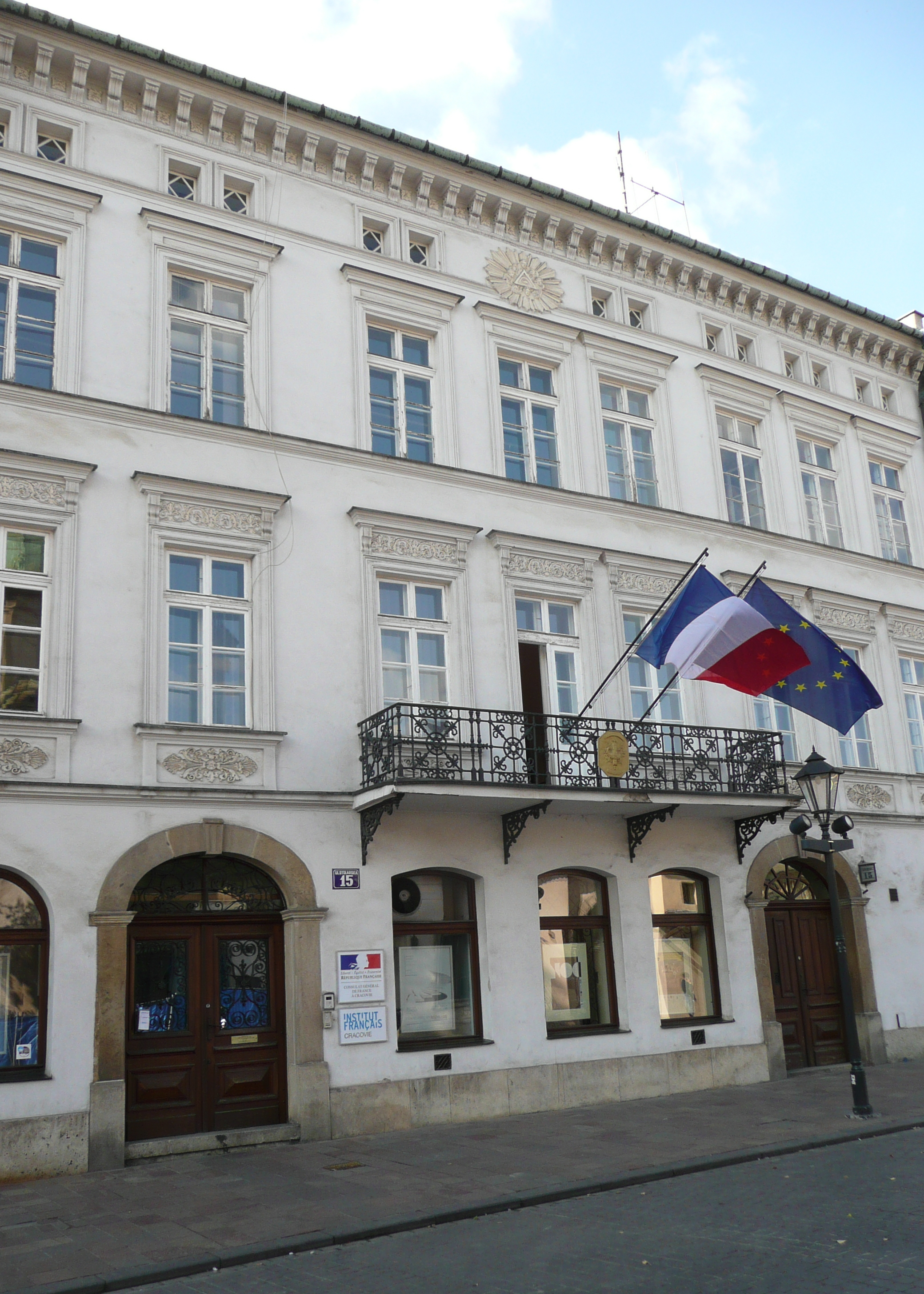 Kamienica, Kraków.